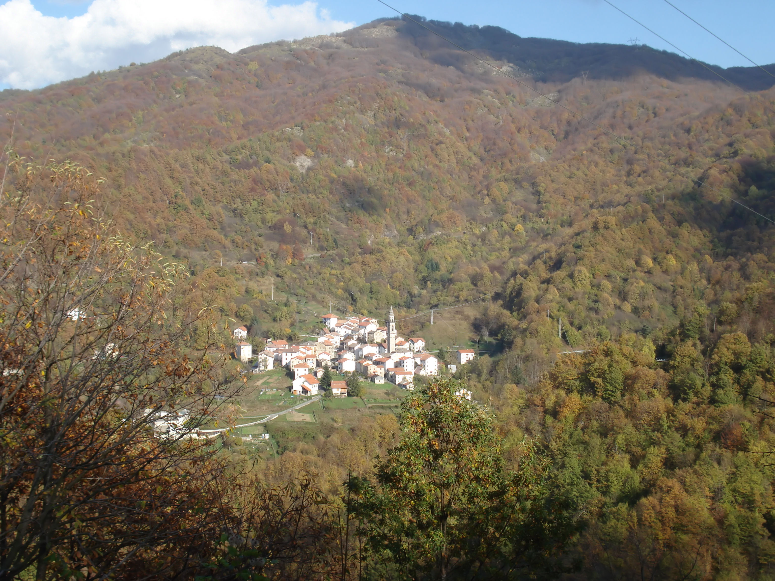 Cosmin latan,26/10/2008,Casoni.